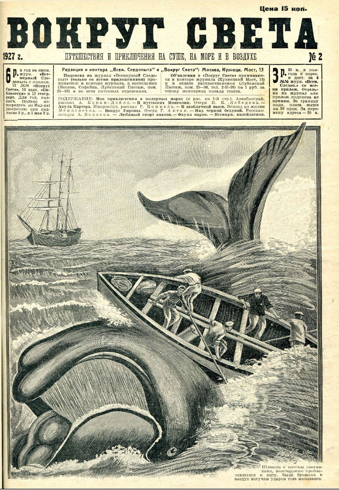 Журнал "Вокруг света", 1927, № 2, обложка